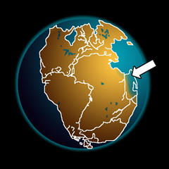 Ubicacion del observador del Génesis en la deriva continental inicial